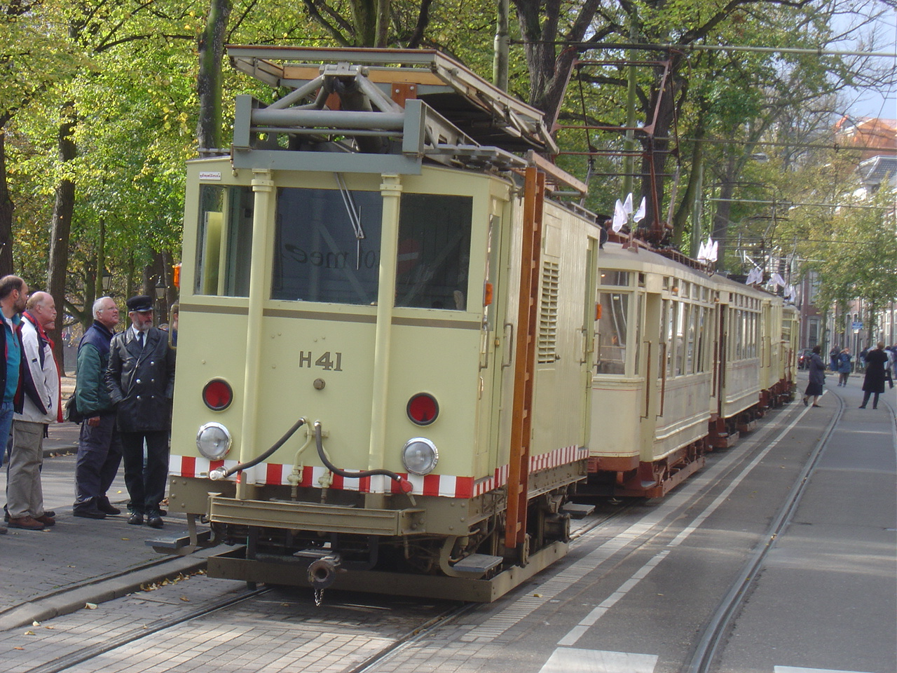 Dieseltinus H41 HTM tijdens de grote tramoptocht in 2004. Eigen foto: Victor van Beekum Licensing Categorie:Afbeelding tram